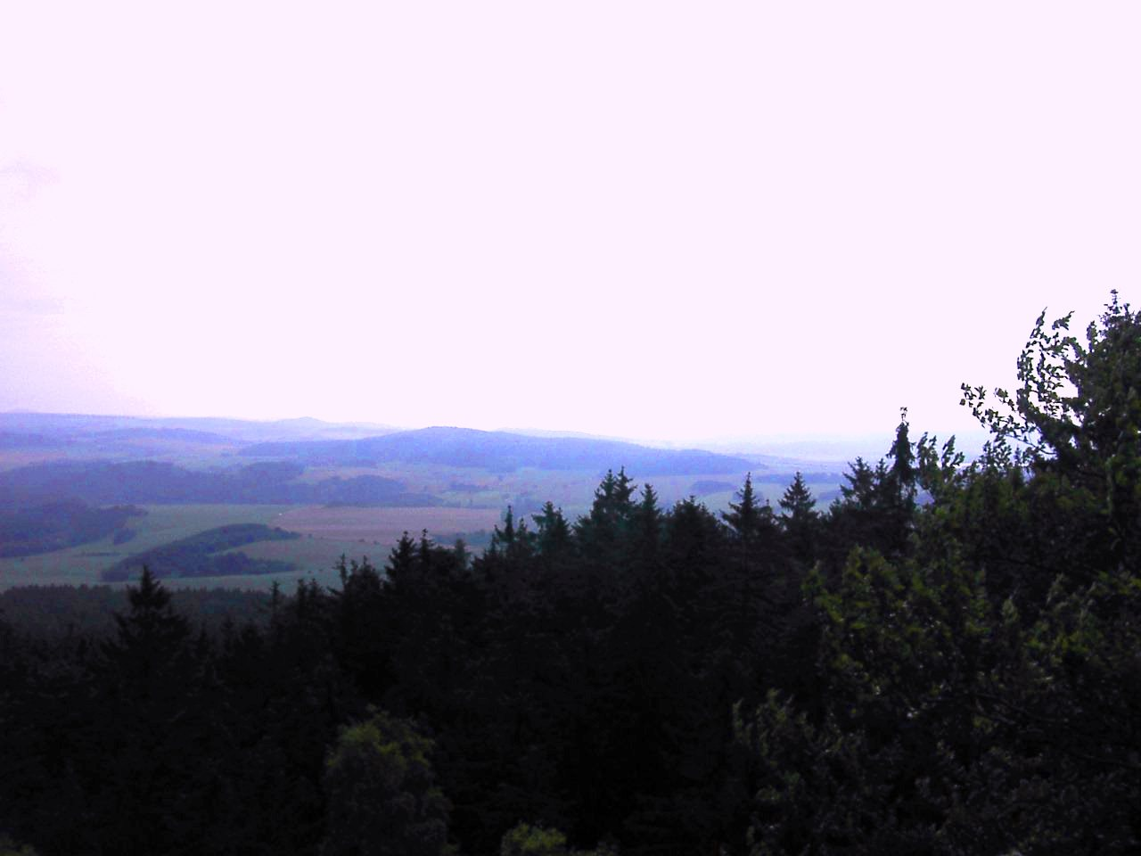 Výhled z vrcholu Hrad nad Lhotou pod Radčem.